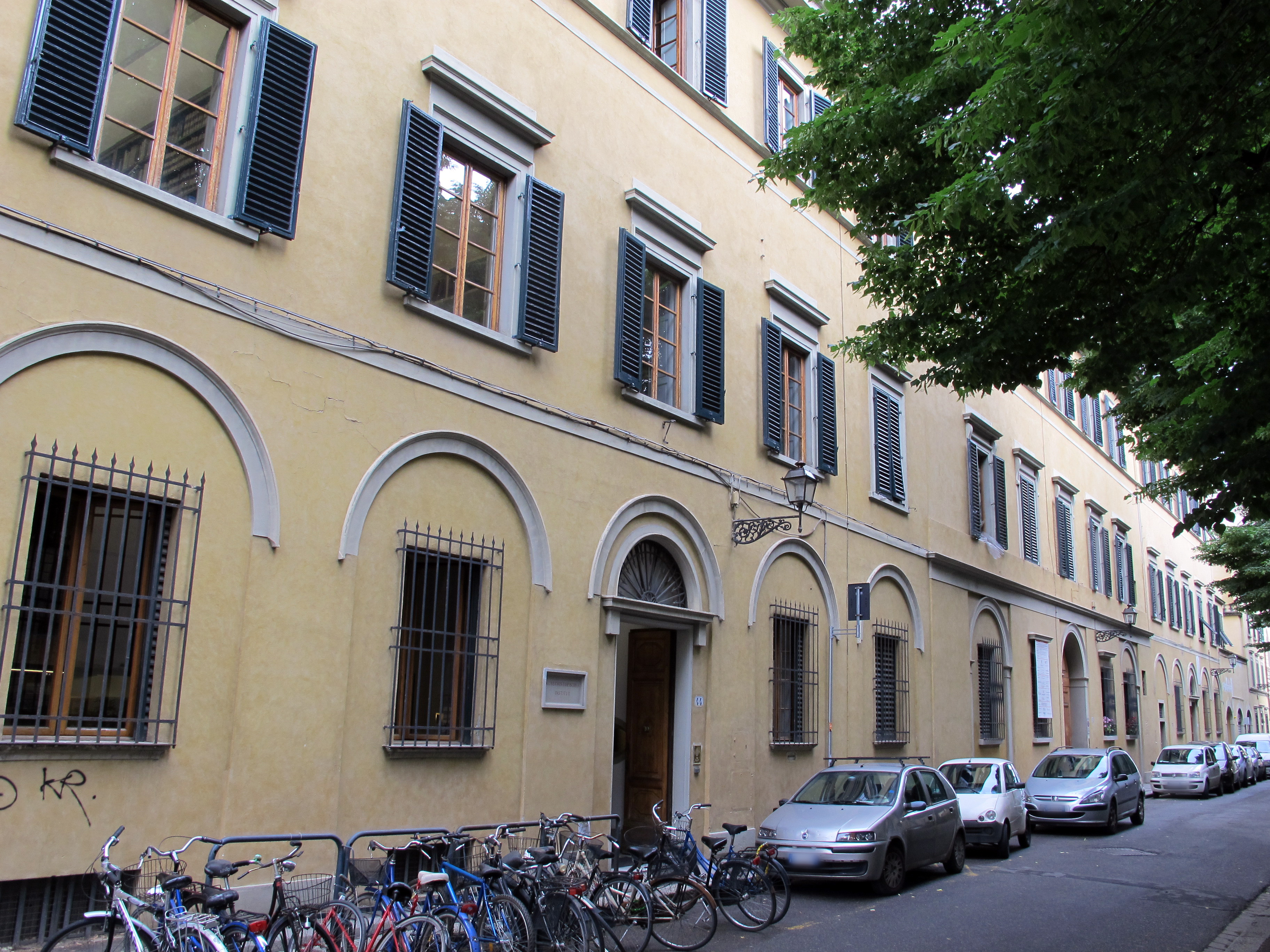 Khi florenz, esterno